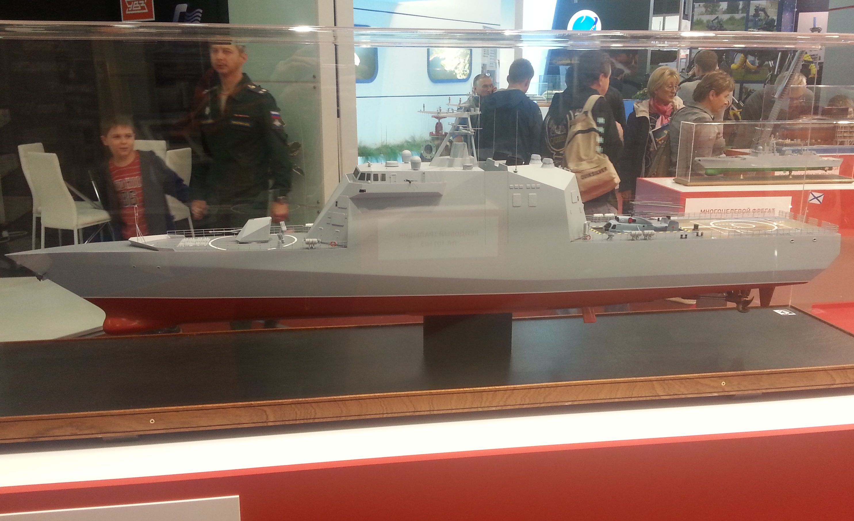 Модель корвета проекта 20386 на выставке «Армия 2016»